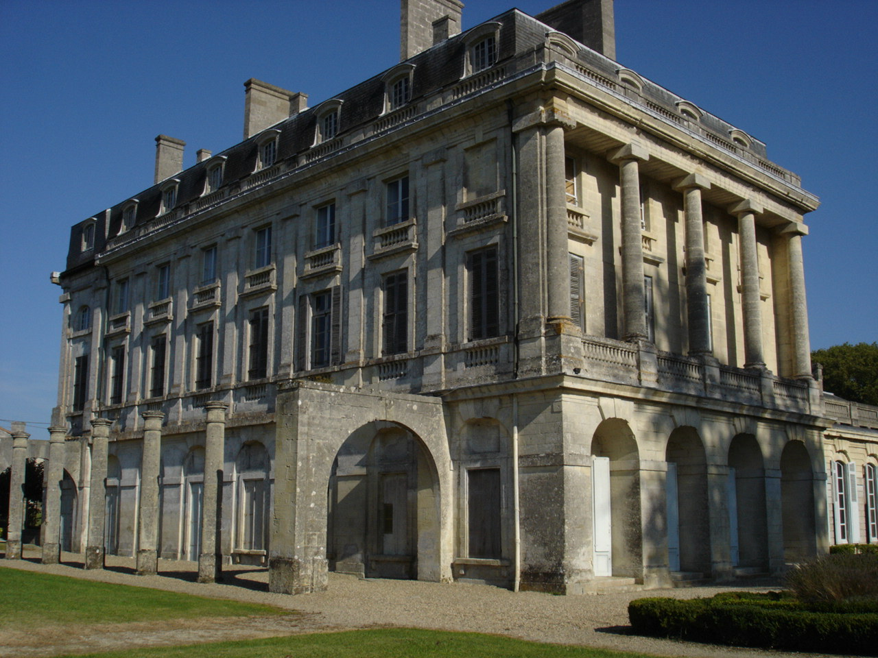 le corps de logis du château du Bouilh (33240 Gironde, France)